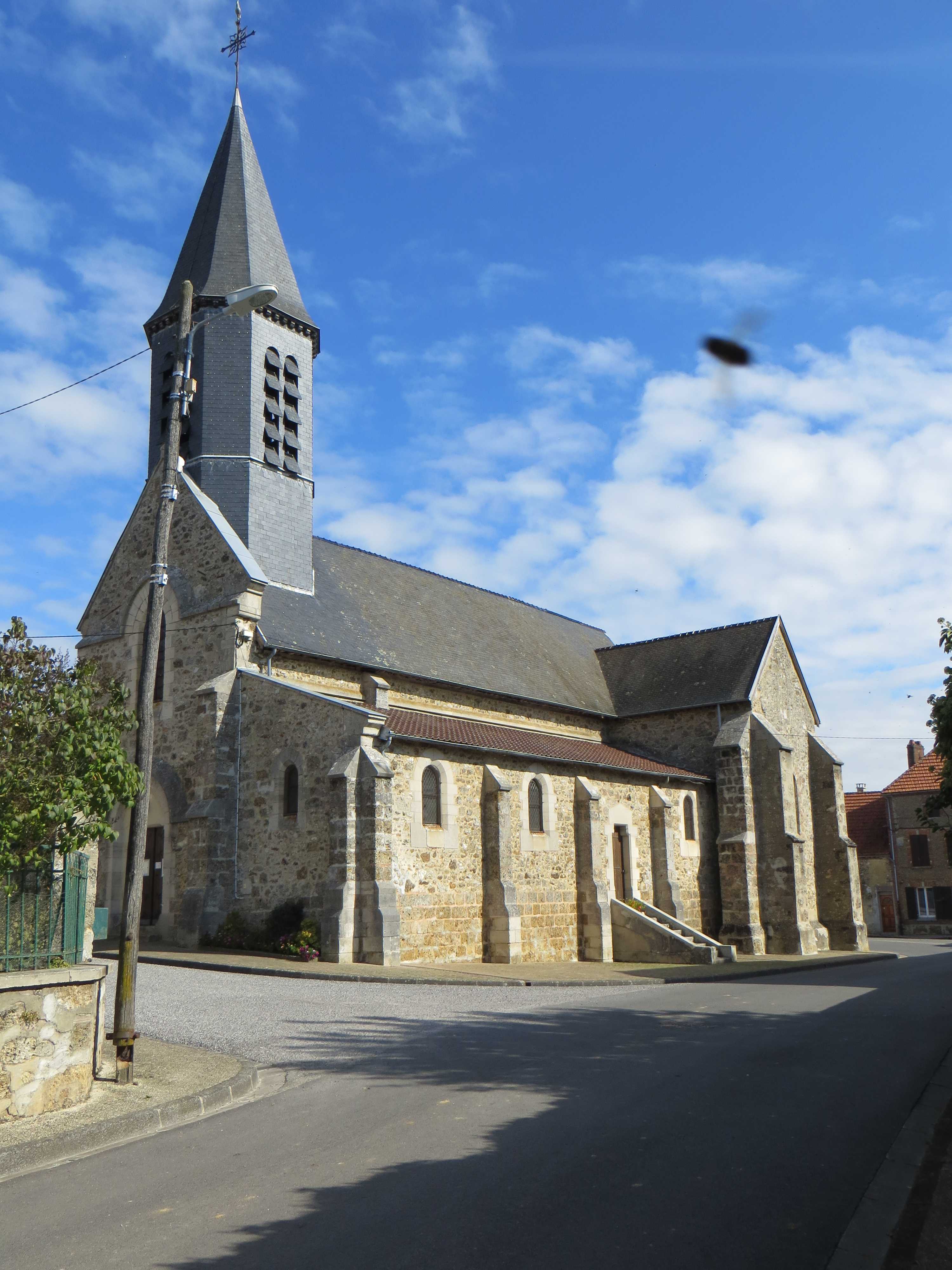 Vue générale de l'église